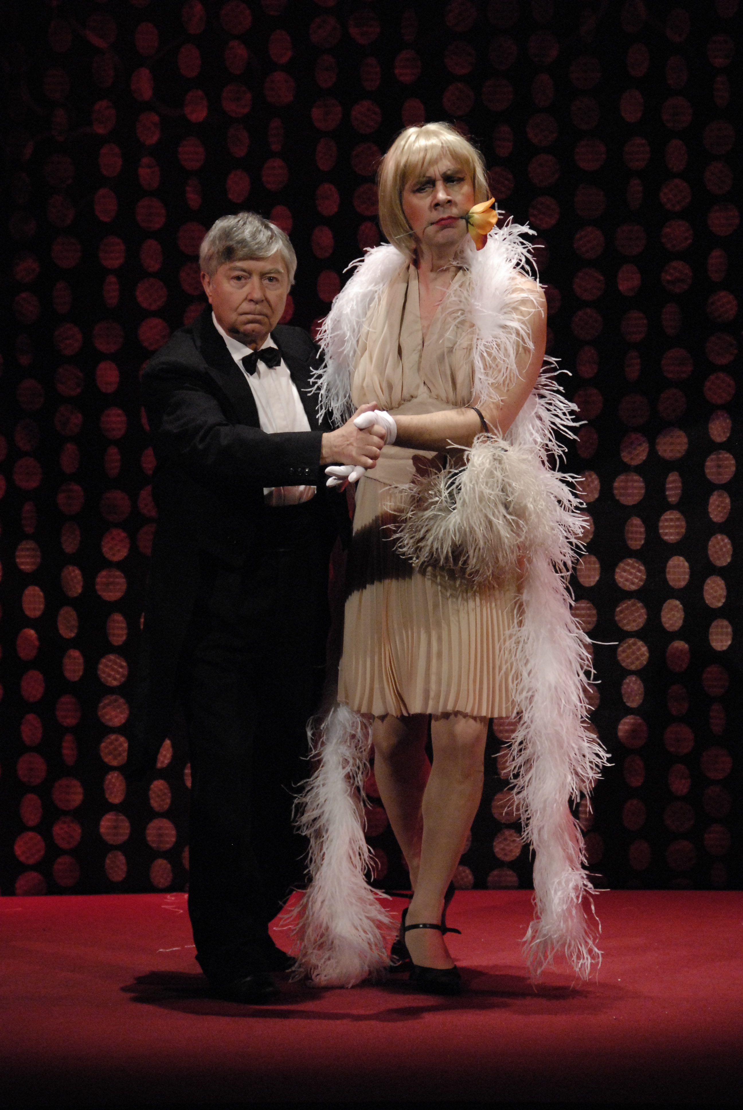 Premijera predstave "Neki to vole vruće"